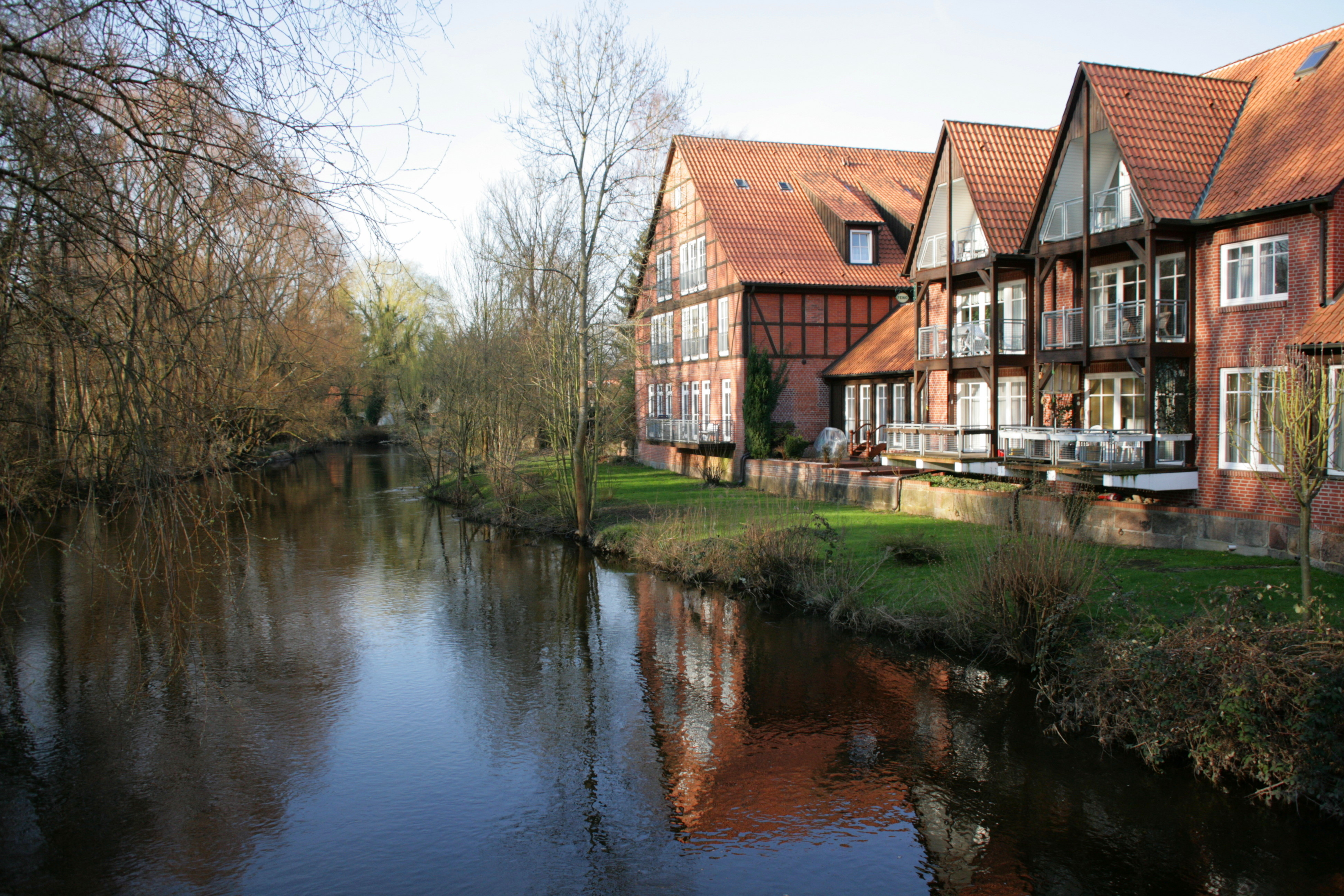 Ilmenau bei der Brückenstraße in Bad Bevensen